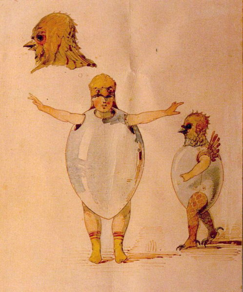 מחול האפרוחים בקליפתם.